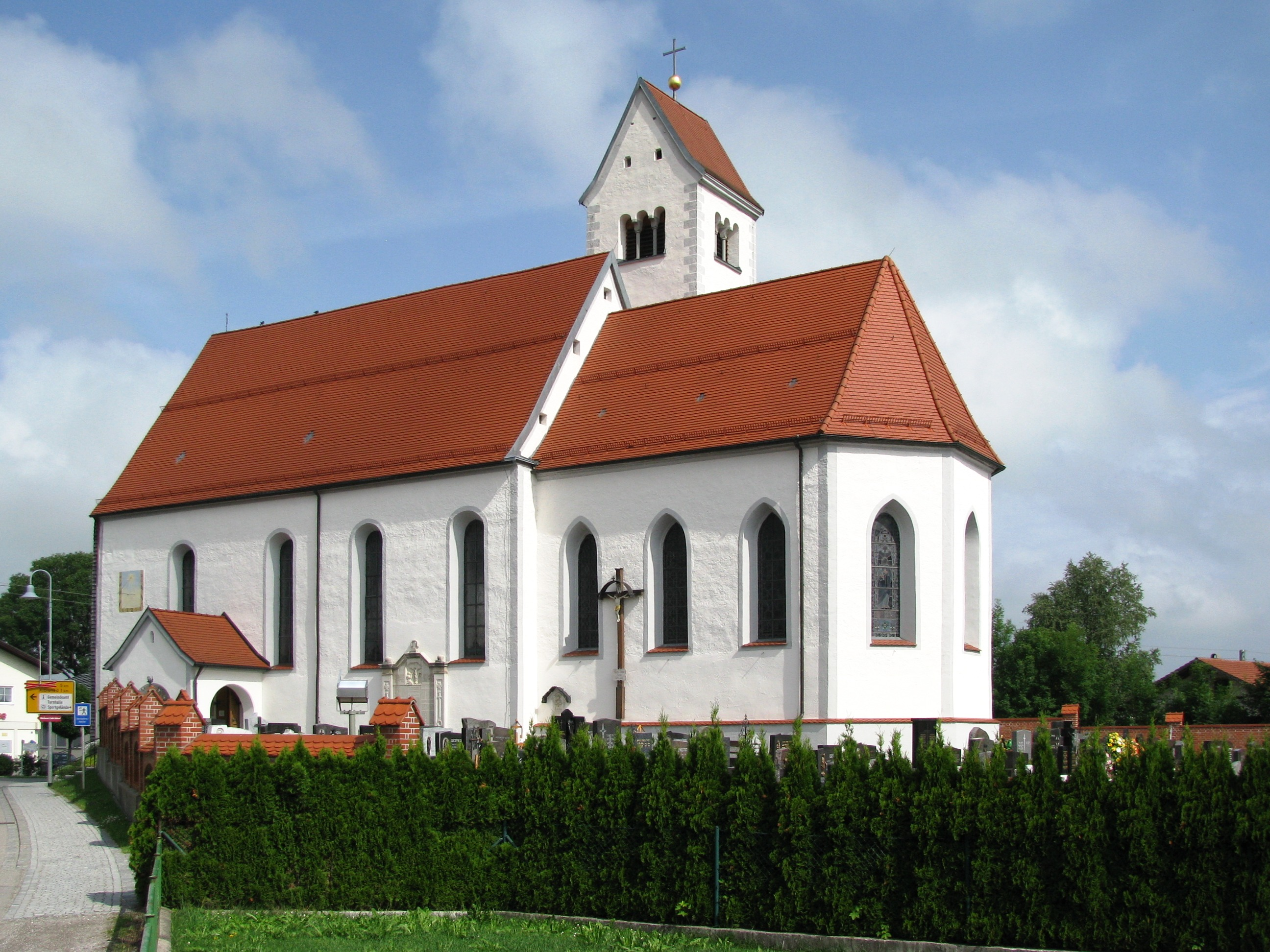 Pfarrkirche St. WolfgangThis is a photograph of an architectural monument.